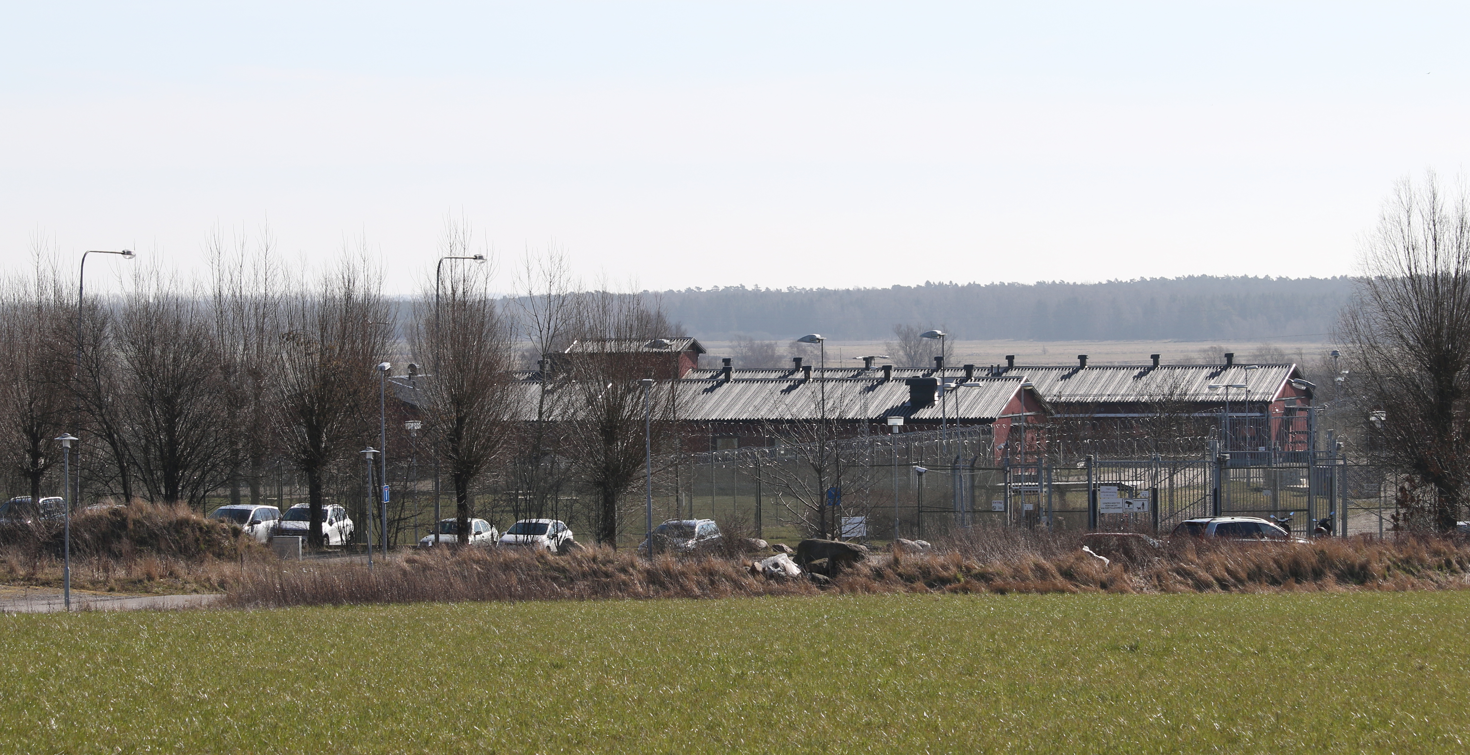 Anstalten Ystad